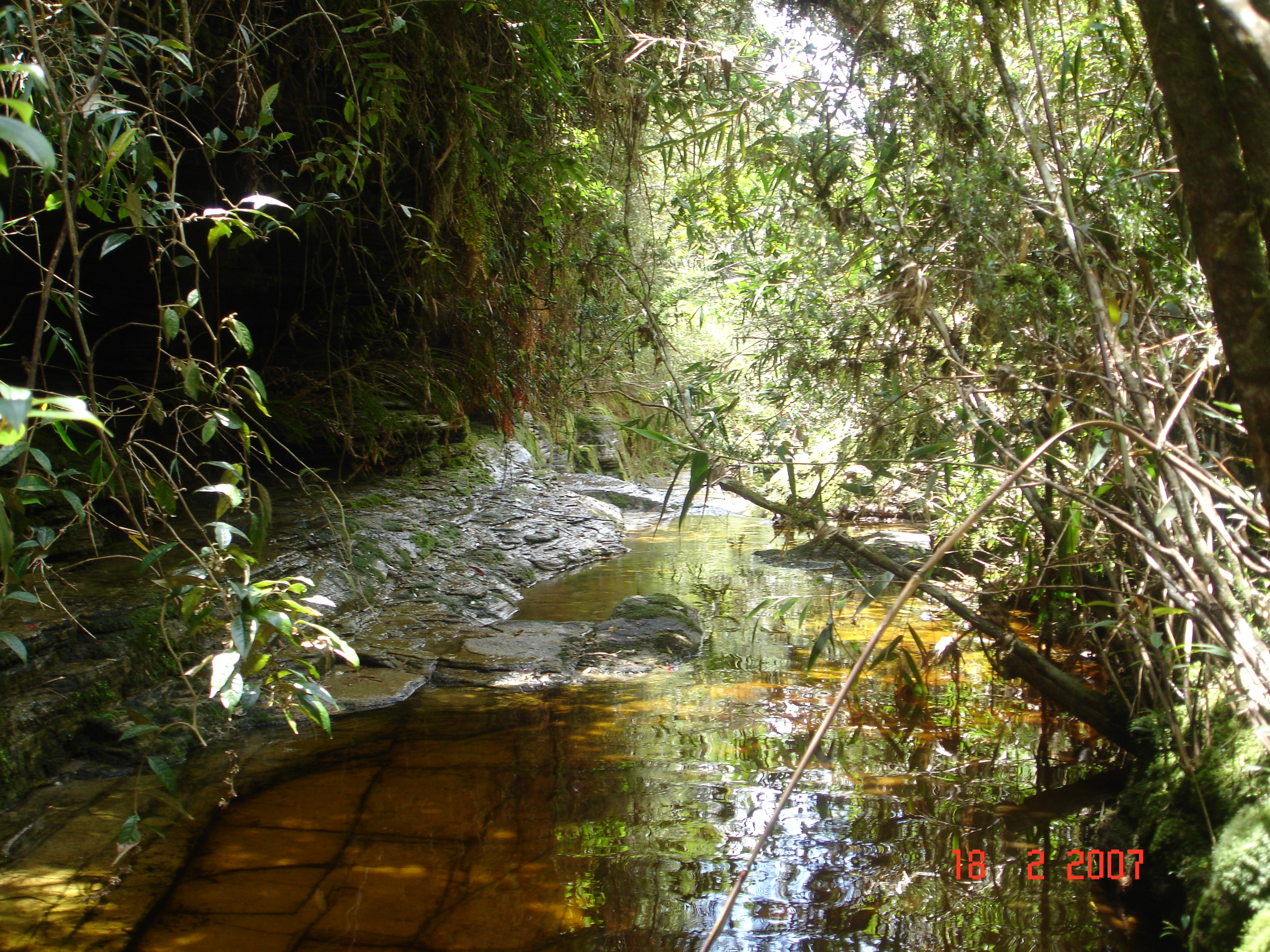 Os rios do parque apresentam cor de caramelo devido ao alto teor de matéria orgânica de origem vegetal, Parque Estadual do Ibitipoca, estado de Minas Gerais, Brasil